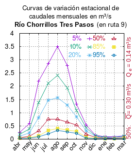 Curvas de variación estacional del río Chorrillos Tres Pasos en Ruta N° 9. # Dirección General de Aguas # Diagnóstico y clasificación de los cursos y cuerpos de agua según objetivos de calidad. Cuenca del río Serrano. # Santiago de Chile # Ministerio de Obras Públicas (Chile) # 2004 # url: # urlarchivo: # Tabla 4.6: Río Chorrillos Tres Pasos ruta Nº 9 (m3/s), pág.29 mes 5% 10% 20% 50% 85% 95% abr 0.267 0.181 0.118 0.064 0.043 0.039 may 0.581 0.388 0.243 0.111 0.058 0.046 jun 2.201 1.389 0.809 0.315 0.134 0.100 jul 2.848 2.120 1.483 0.749 0.323 0.197 ago 3.505 2.416 1.572 0.762 0.406 0.326 sep 2.779 1.943 1.286 0.641 0.349 0.280 oct 1.324 1.082 0.847 0.530 0.298 0.212 nov 0.533 0.423 0.318 0.179 0.080 0.044 dic 0.153 0.130 0.107 0.071 0.040 0.026 ene 0.084 0.073 0.062 0.043 0.026 0.018 feb 0.086 0.076 0.065 0.046 0.027 0.018 mar 0.137 0.116 0.094 0.061 0.032 0.019 This plot was created with Gnuplot.